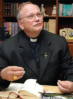 Dom Bruno Gamberini, Arcebispo Metropolitano de Campinas, SP., Brasil